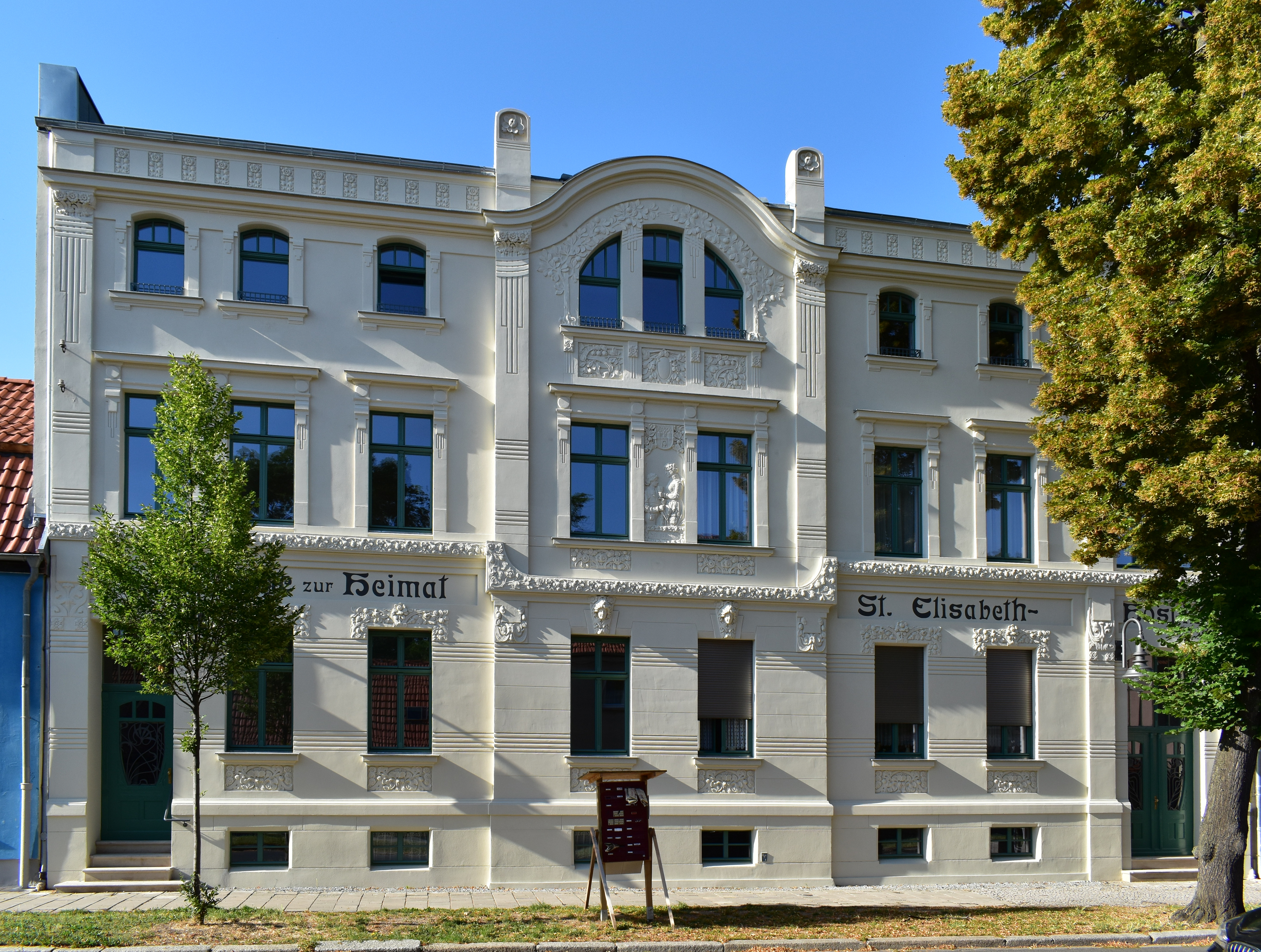 Gebäude Auf dem Graben 75 in Aschersleben, nach der Sanierung.